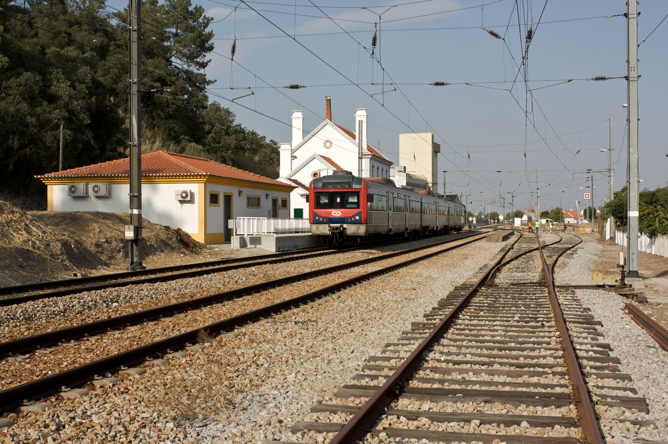 Tipo: Comboio Regional 4908 [Coruche - Setil] Local: Estação de Coruche [Linha de Vendas Novas, PK 31] Data e hora: 8 de Setembro de 2009 [17h33] Material: Automotora 2282 [Unidade Tripla Eléctrica]